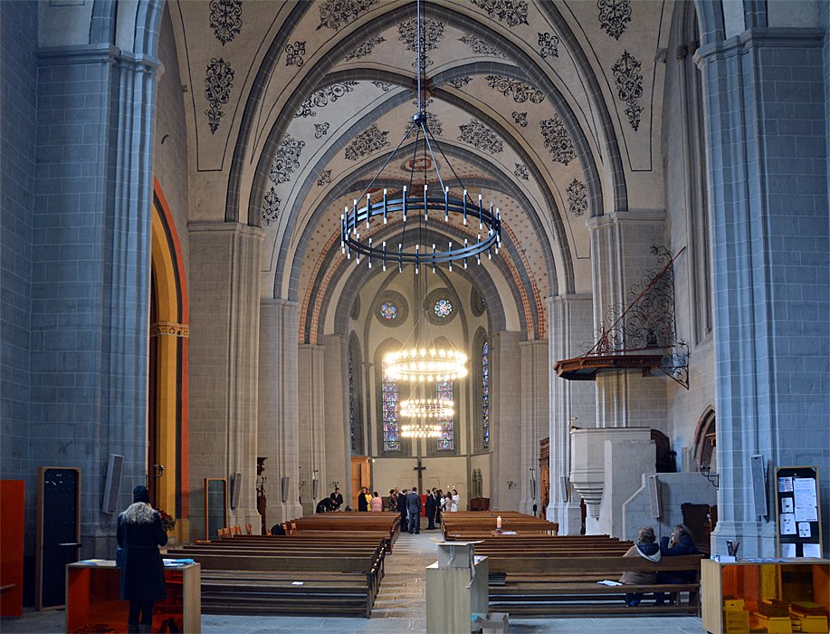 Eglise St François, Lausanne